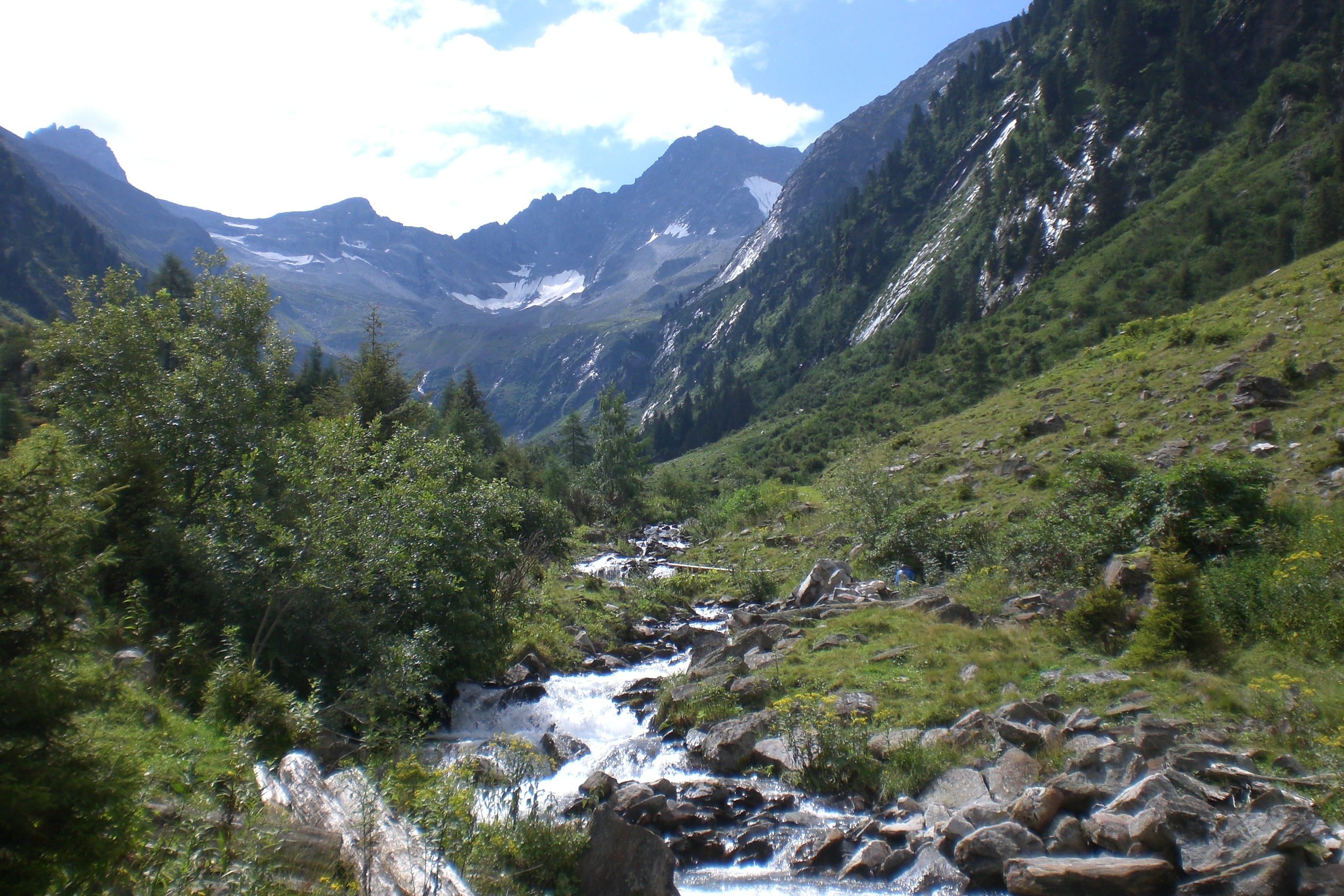 Gunggl, fast unberührtes Seitental des Zemmgrunds (Zillertaler Alpen).